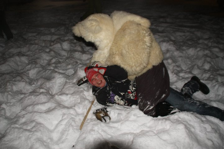 In Altaussee gibt es daneben auch Pelzperchten (Bärigln)[8]. Am 5. Januar ist der so genannte Glöckötåg (Glöcklertag). Am Abend (ca. 17h) findet auf einem zentralen, meist tief verschneiten Feld im Dorfzentrum ein symbolischer Kampf der den Frühling repräsentierenden, laut läutenden „Glöckler“ mit den Bärigln (Pelzperchten) statt, die den Winter repräsentieren. Die Glöckler versuchen den Winter "auszuläuten" die Perchten wehren sich vehement dagegen wodurch ein wilder Kampf entsteht. Um Mitternacht ist der Spuk dieser letzten Rauhnacht vorbei.Der Percht kontrolliert das Haus auf Sauberkeit – ganz im Sinne der Frau Perchta-Sage – und darf, während er sein Gesicht noch verborgen hält, kein Wort sprechen.